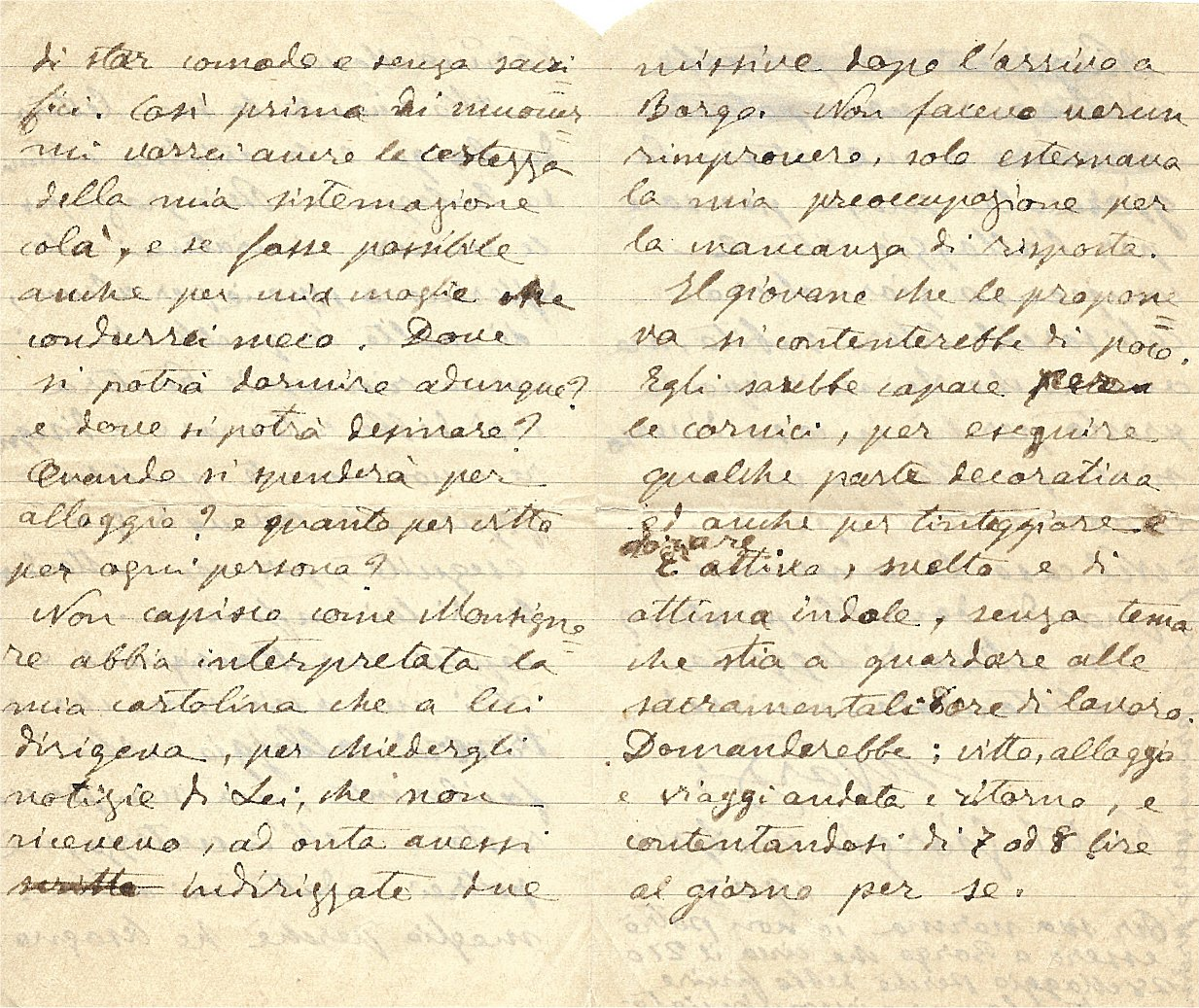 Lettera datata 24.4.1923 spedita da Sigismondo Nardi da Porto San Giorgio a Antonio Mosca Borgo Valsugana